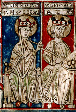 Miniatura representando a Alfonso VIII de Castilla junto a su esposa Leonor de Plantagenet, del Tumbo menor de Castilla